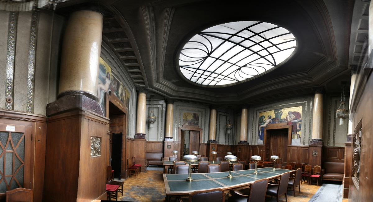 Profesorska čitaonica u Hrvatskom državnom arhiu. Nalazi se na istočnoj strani atrija, prva do Velike čitaonice. U sredini prostorije nalaze se dva stola s po osam polunaslonjača. Svjetiljke u Profesorskoj čitaonici, izvedene u Beču prema nacrtu Lubyskog, karakterističnog su secesijskog oblika od opalnog stakla. Velki prozor na istočnoj strani sastoji se od šest prozorskih krila ukrašenih vitrajima. Svi supraporti ukrašeni su uljima na platnu.